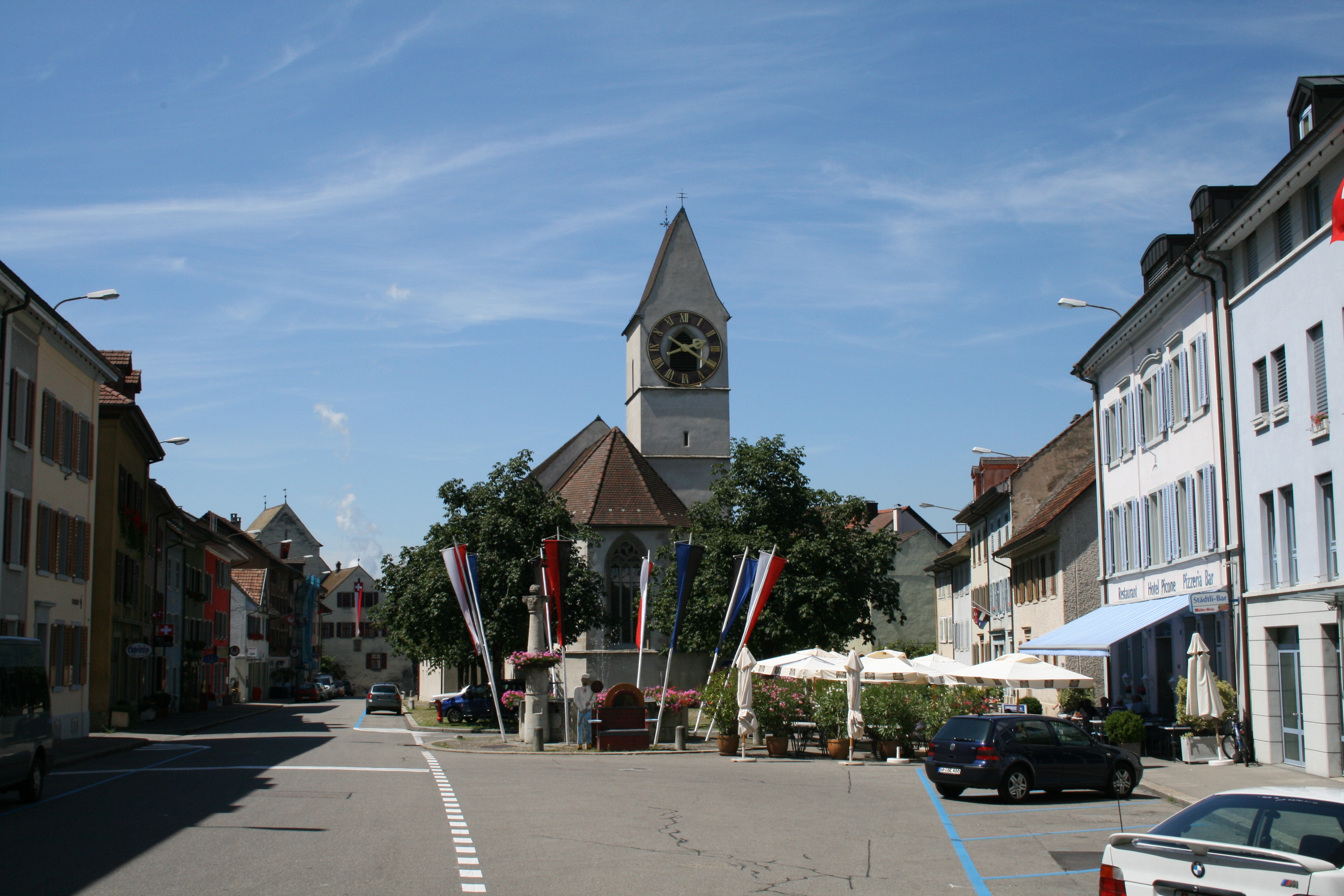 Altstadt von Klingnau, Aargau, Schweiz